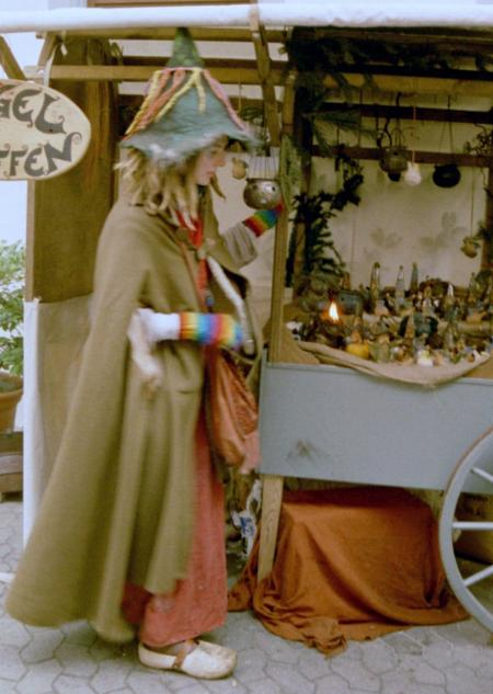 Esslingen - Weihnachtsmarkt - Verkaufsstand